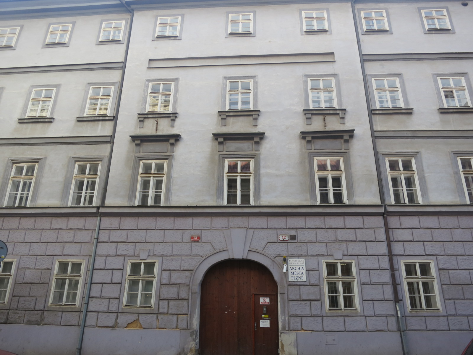 Budova Archivu města Plzně, Veleslavínova 12/19.